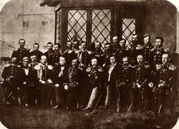 Писатель И. А. Гончаров среди офицеров фрегата "Паллада". 1852